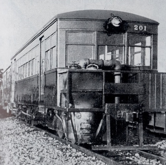 名鉄キハ200形ガソリンカー（元・三河鉄道キ50形）